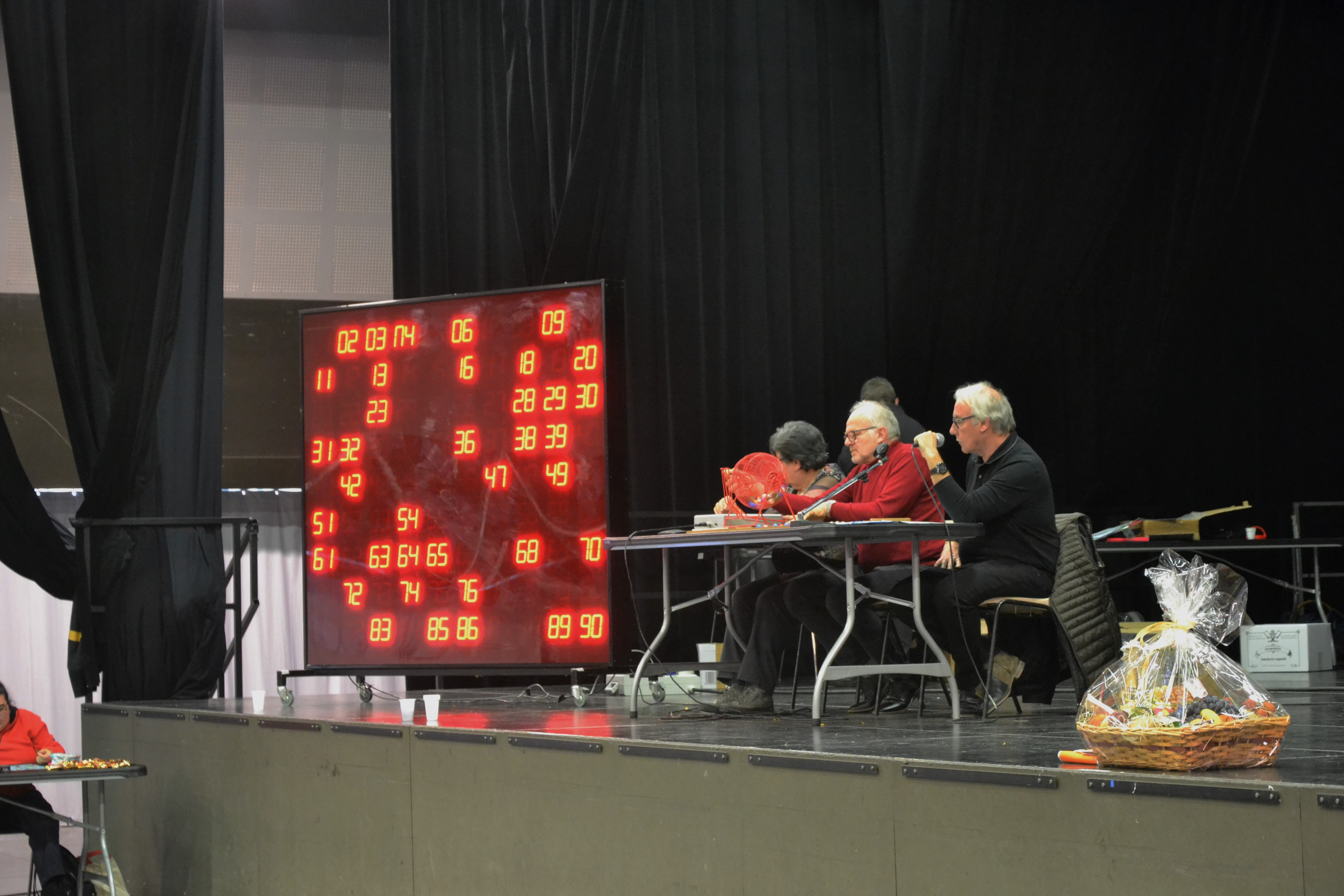 Loto 2018 de l'association des Donneurs de sang de Carpentras